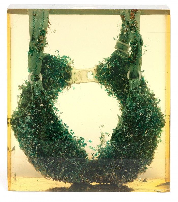 „Popiersie” jest jednym z bardzo niewielu istniejących obiektów z niezwykle istotnego, intensywnego okresu w działalności twórczej Teresy Murak z połowy lat 70., kiedy wykształciła ona własny, oryginalny język wypowiedzi artystycznej. Artystka odnosiła się wówczas do krajobrazu miejskiego i podmiejskiego, relacji między naturą a ciałem ludzkim, odpowiedzialności za ekosystem (zwłaszcza w swych mniej spektakularnych formach: błocie, pyle, chwastach etc.), jednocześnie wpisując swą twórczość w konstelację duchowych referencji o fundamentach zarówno pogańskich jak i judeochrześcijańskich. „Popiersie” jest artystyczną próbą zatrzymania czasu – rzeźba z tkaniny i rzeżuchy została zakonserwowana w pleksiglasie (co wymagało licznych prób z materiałem, współpracy z laboratorium chemicznym etc.), stanowiąc surrealny obiekt odwołujący się do wzrostu i obumierania, ciała ludzkiego, jak i petryfikującej mocy sztuki oraz instytucji muzealnych. Rzeźba „Popiersie” była eksponowana podczas ważnych wystaw sztuki współczesnej np. „Figura w rzeźbie polskiej XIX i XX wieku” w Galerii Narodowej Zachęta (1999). Jest rzadkim dziełem sztuki o wysokiej wartości muzealnej, jednym z obiektów w których Murak splata tradycja sztuki o proweniencji ekologicznej, duchową refleksję i wątki feministyczne.